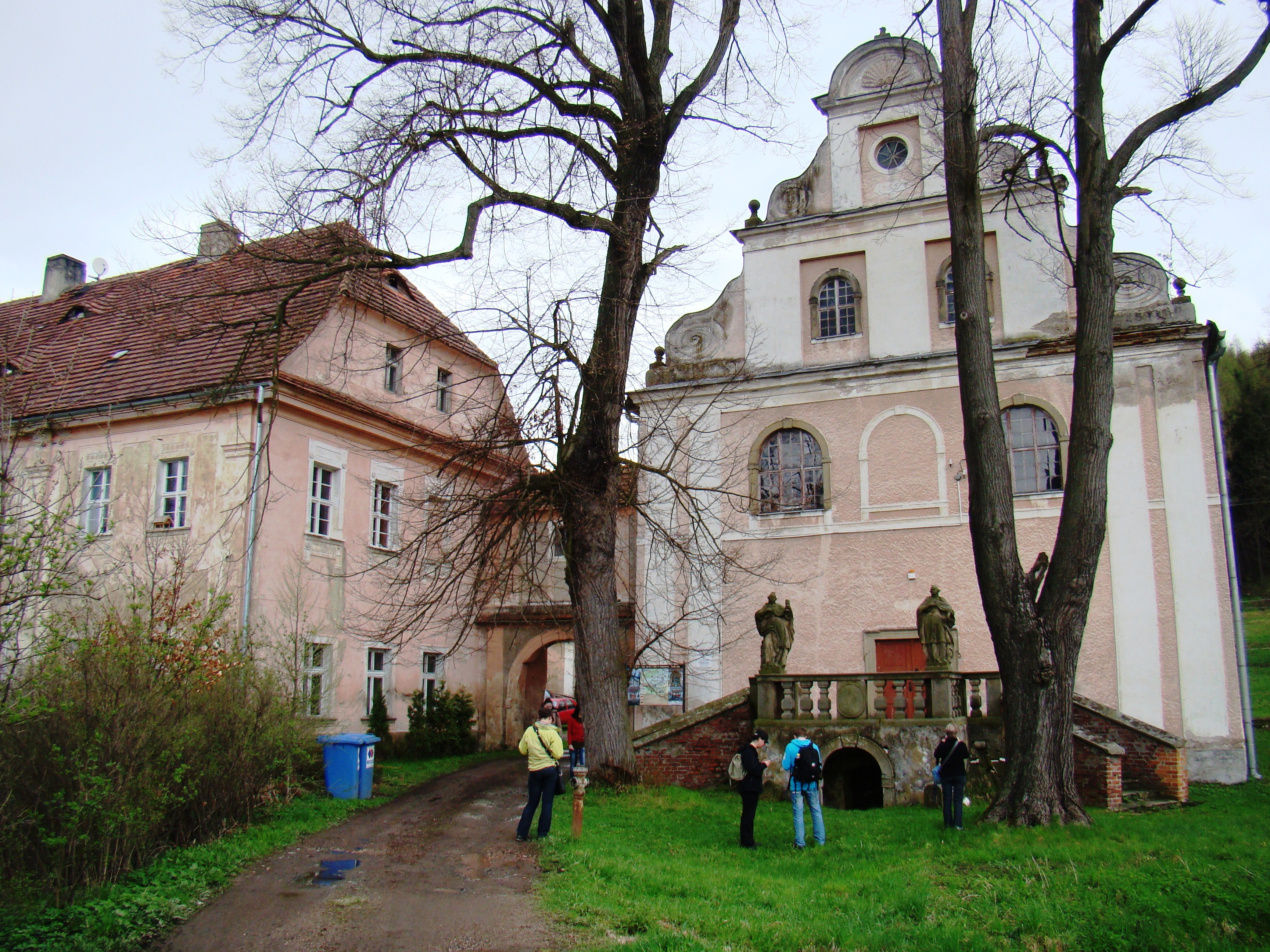 Lubawka - Ulanowice, pałac, 1687, kon. XVIII